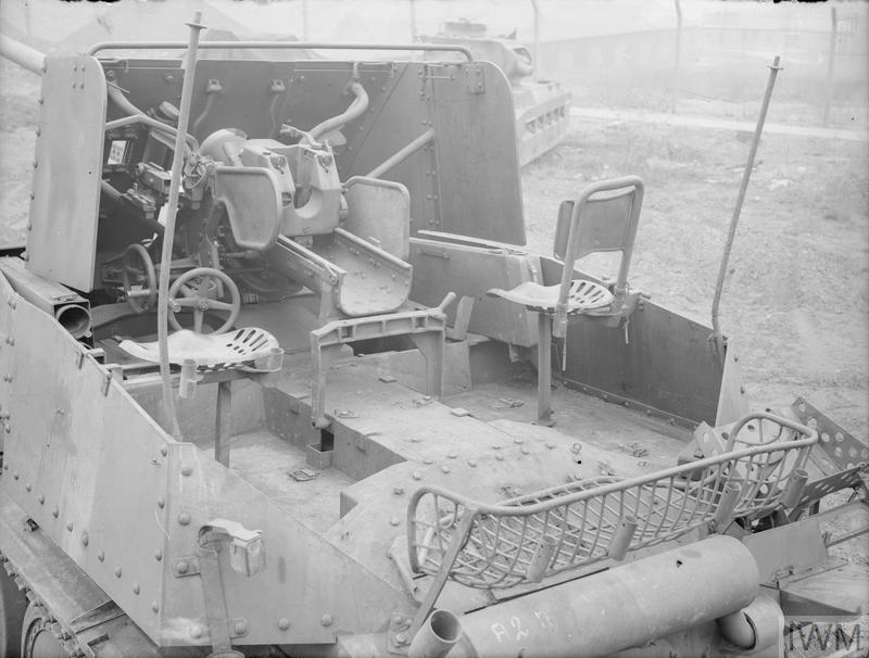 Panzerjäger 38(t) für 7.62 cm PaK 36(r), Sd.Kfz. 139 (Marder III)